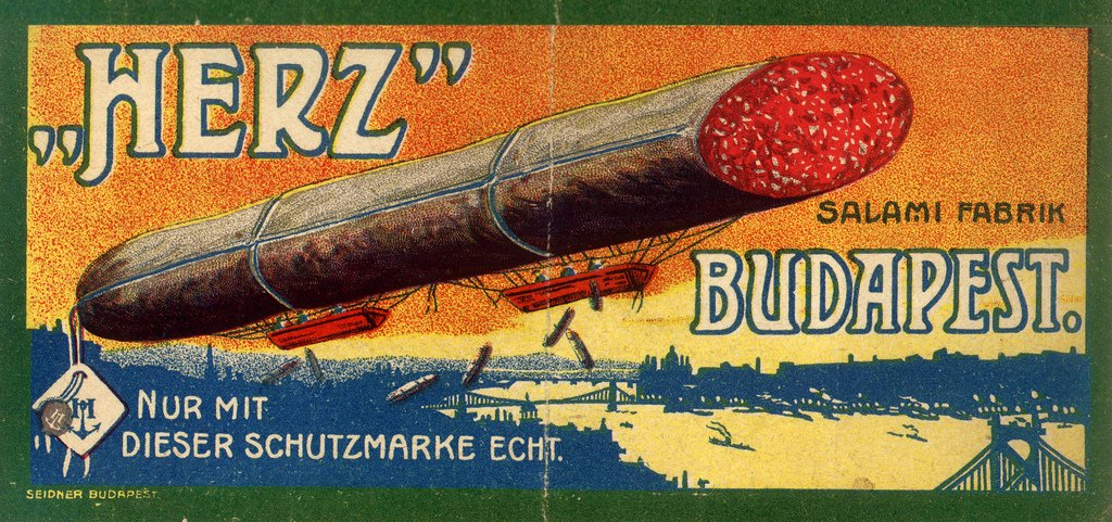 Herz szalámigyár reklám grafika